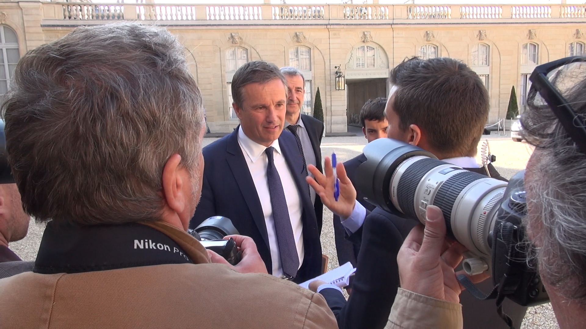 Nicolas Dupont-Aignan interviewé à l'Elysée